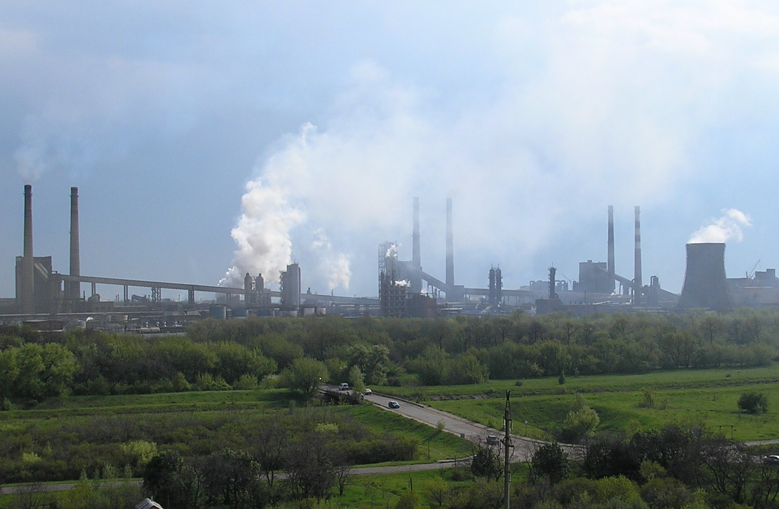 Ясинівський коксохімзавод (Макіївка)